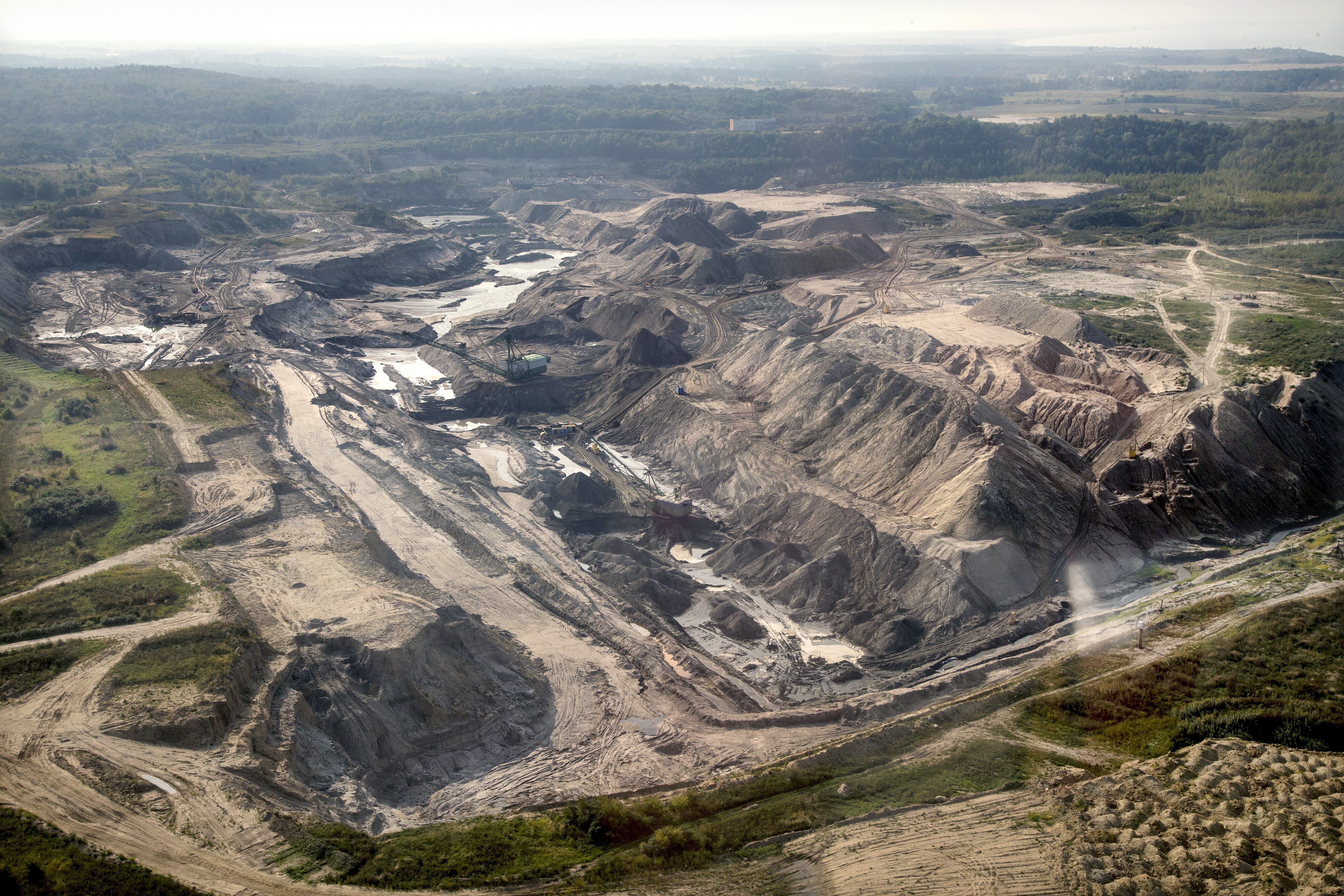 Приморский карьер Янтарного комбината, посёлок Янтарный, Калининградской области России.